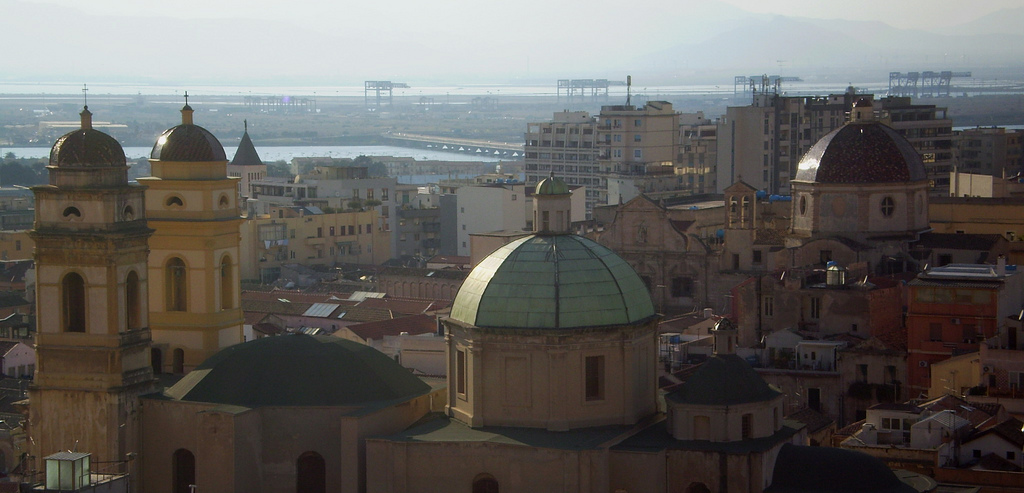 In primo piano: Sant'Anna (barocco piemontese). In secondo piano: San Michele (barocco spagnolo) Campanile in fondo: Chiesa del carmine (architettura moderna)